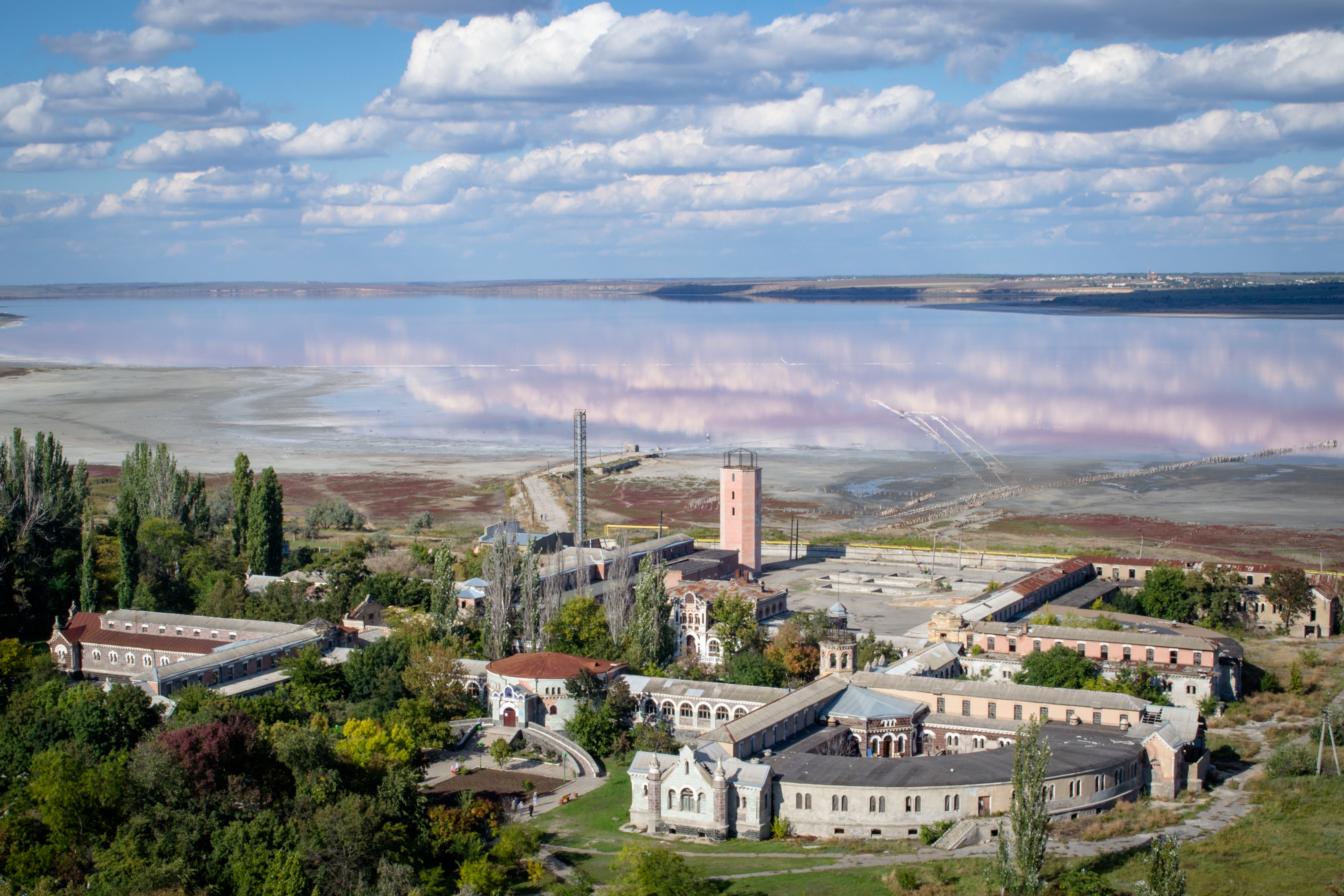 Комплекс будинків першої в Російській Імперії грязелікарні, заснованої одеським лікарем Е. Андріївським у 1892 р., Одеса, Куяльник